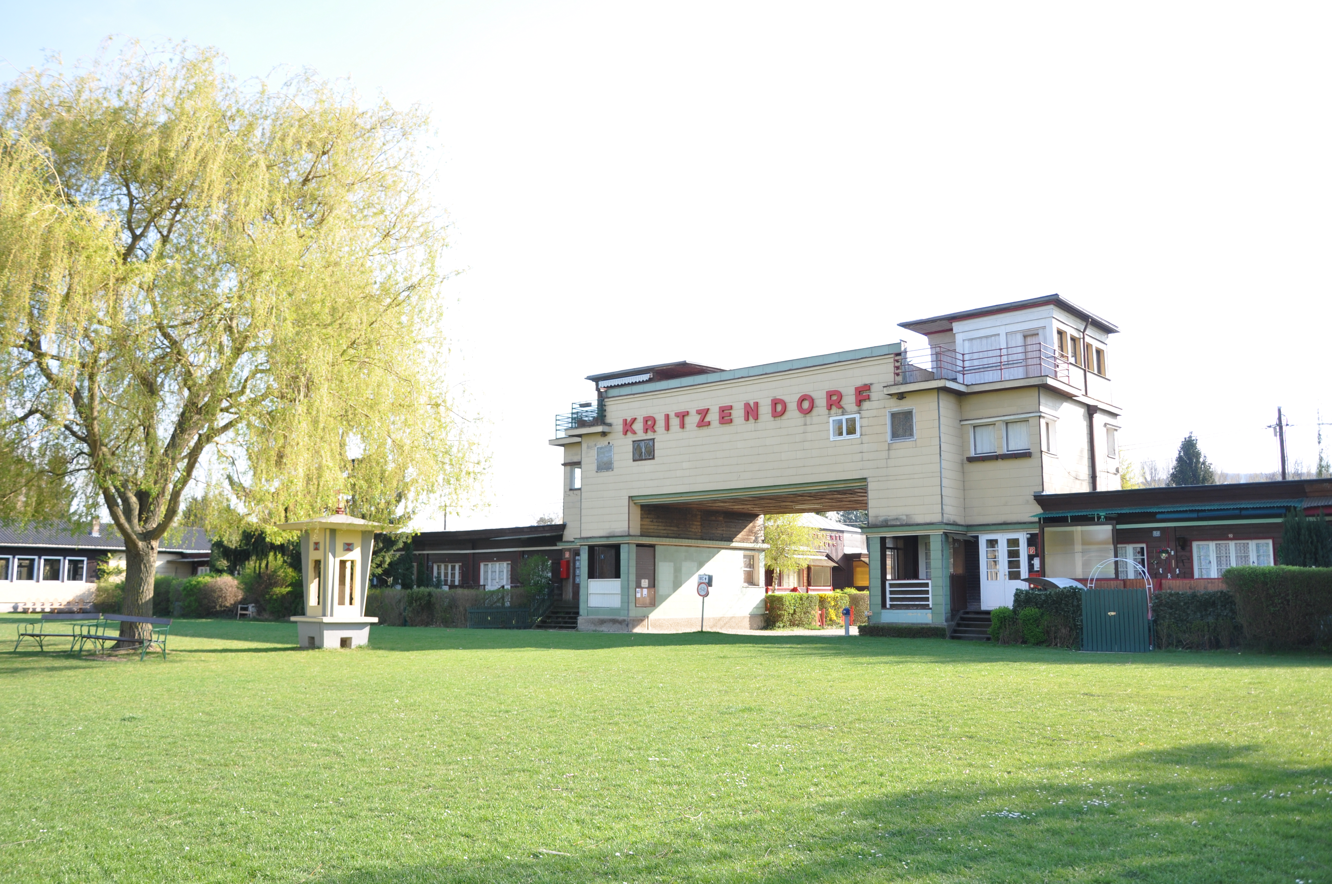 Frühlingsansicht der öffentlichen Liegewiese im Strombad Kritzendorf (Klosterneuburg, Österreich) mit dem von Architekt Heinz Rollig 1928 fertiggestellten Hauptgebäude.